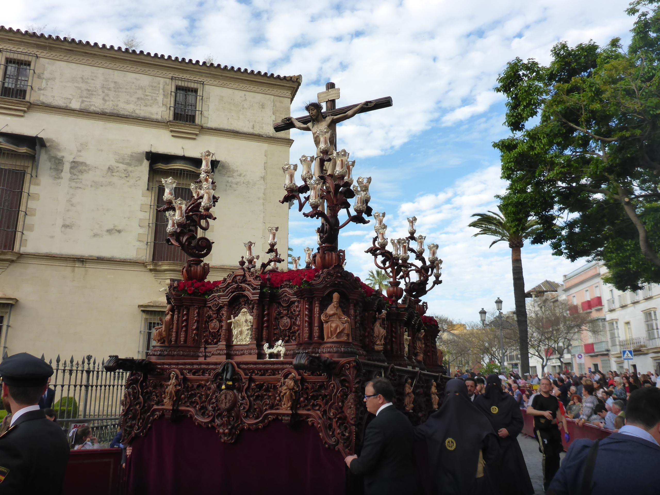 Hermandad del Perdón (Jerez)